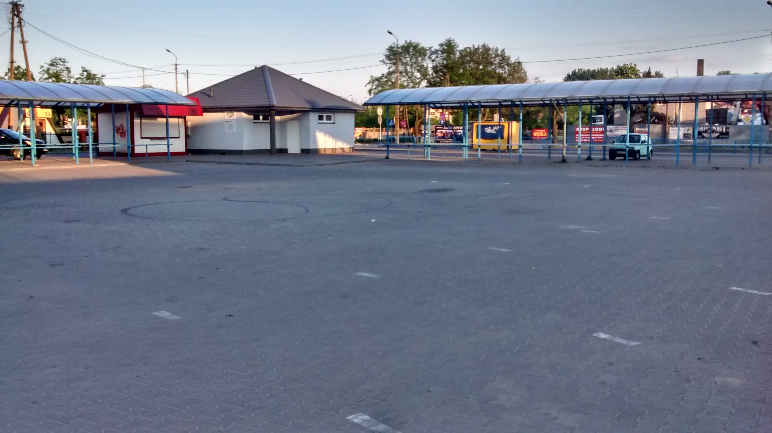 Wiaty handlowe na Pl. Dąbroowskiego